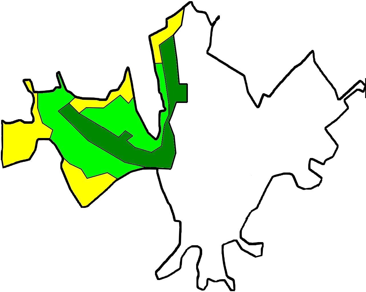 Mapa de IDH da Zona Oeste de Guaratinguetá